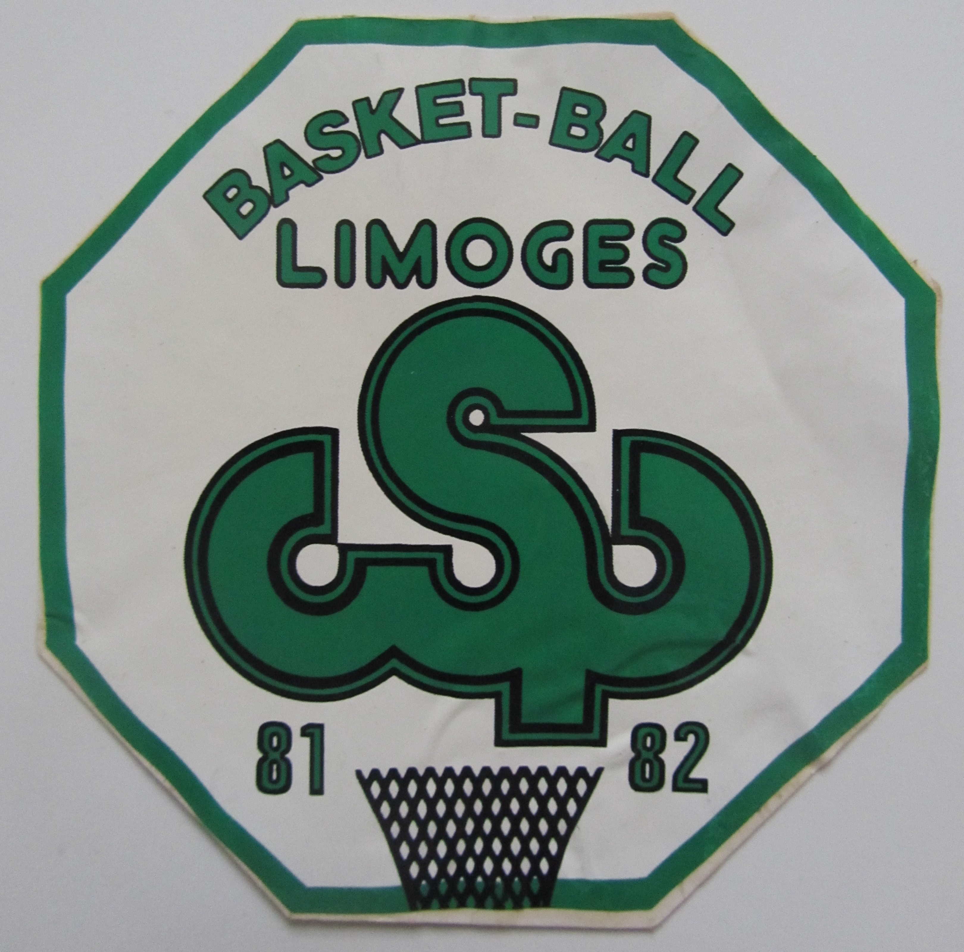 sigle du csp, oeuvre personnel